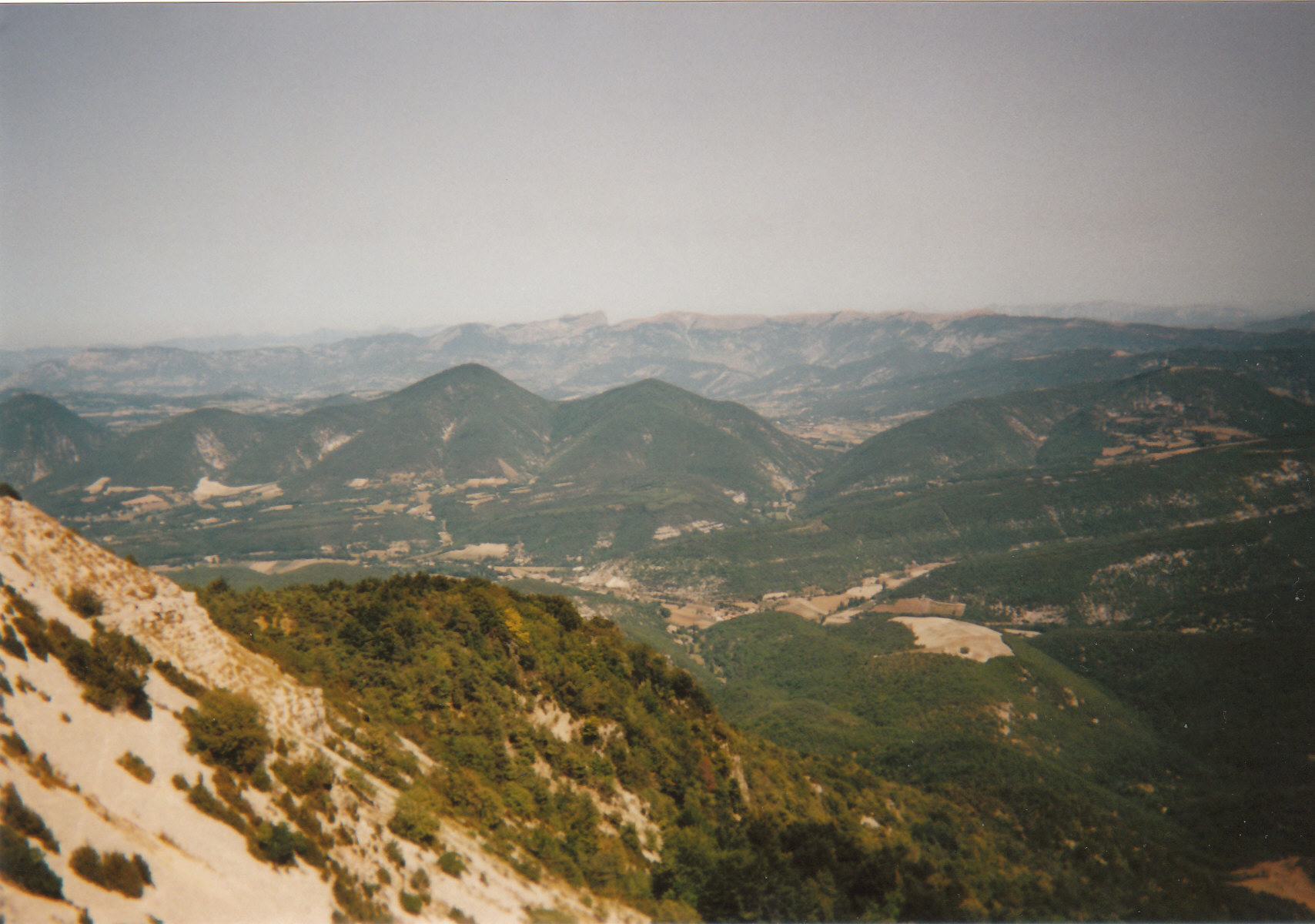 Vue sur les 3 Becs